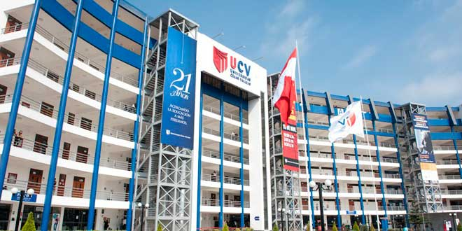 Universidad César Vallejo de Lima, Perú. La foto es de mi pertenencia. Tomada el 28 de enero del 2013.